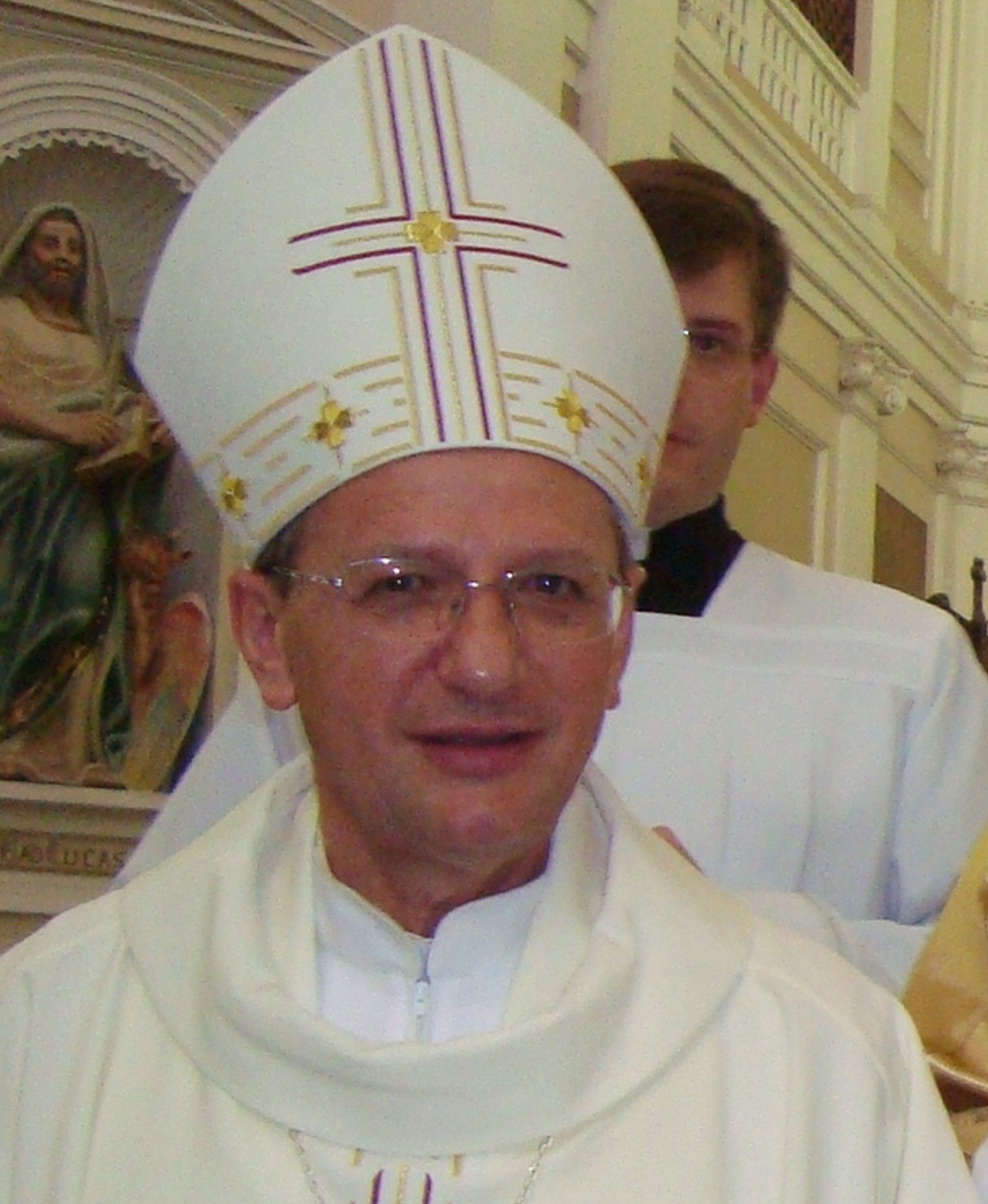 Dom Agenor Girardi, Bispo-Auxiliar da Arquidiocese de Porto Alegre, Brasil.